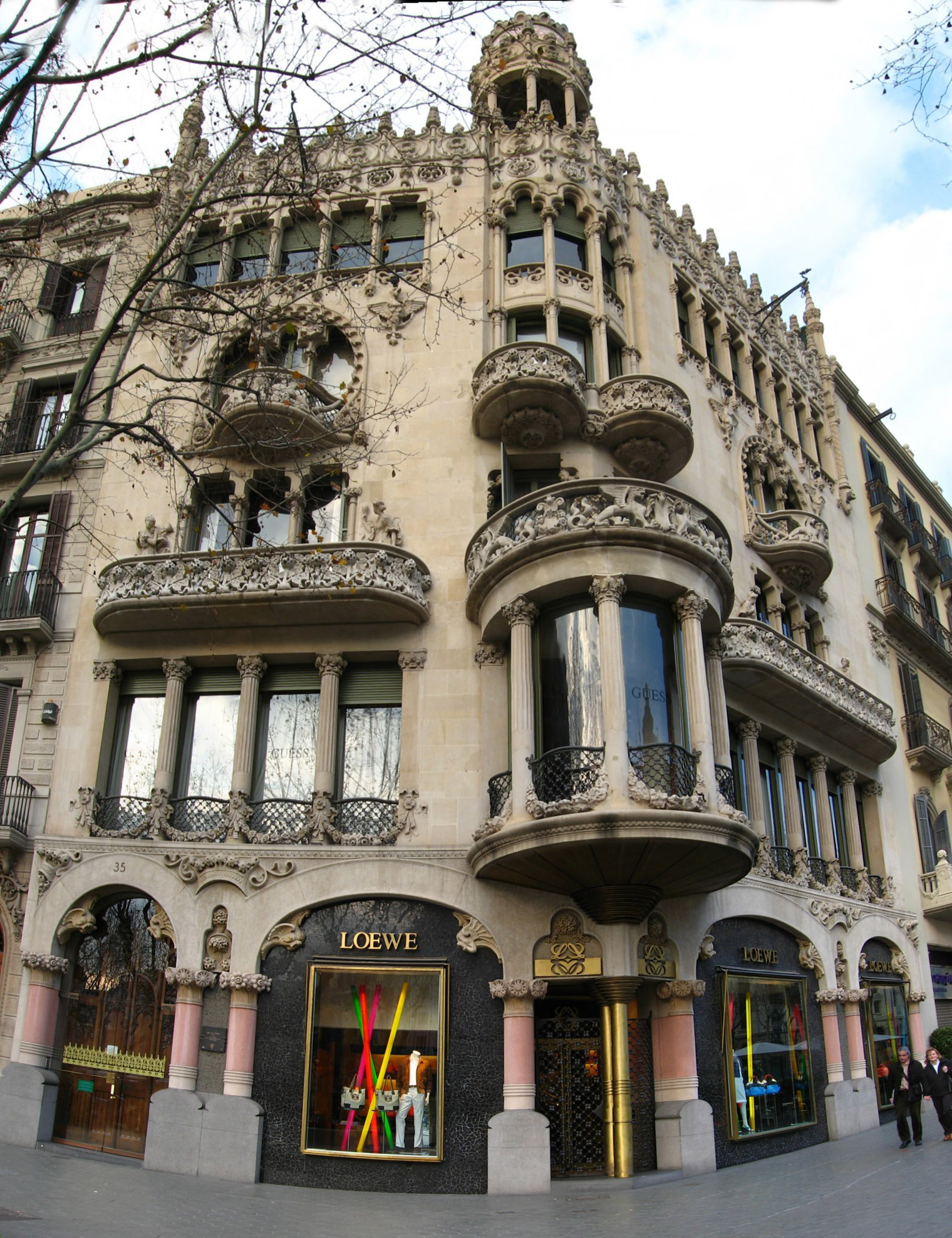 Casa Lleó Morera, obra de Lluís Domènech i Montaner (1902). Ubicada en Psg.de Gràcia, 35 (Barcelona), compta amb l'obra dels artistes: Lluís Bru els mosaics; Antoni Serra i Fiter la ceràmica; Antoni Rigalt i Blanch els vitralls; Gaspar Homar i Josep Pey els mobles i fusteria; Eusebi Arnau les escultures.